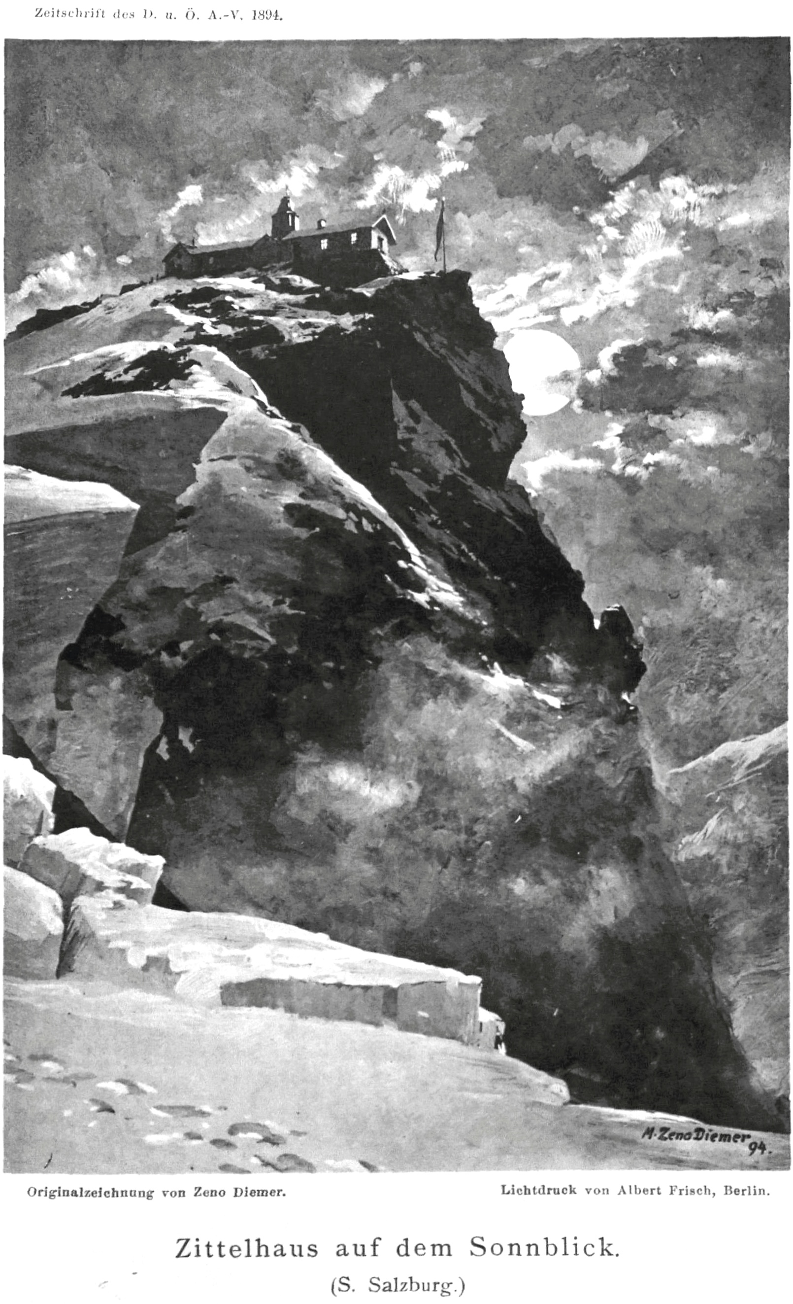 Zittelhaus auf dem Sonnblick aus Zeitschrift des Deutschen und Oesterreichischen Alpenvereins 1894 Band 25